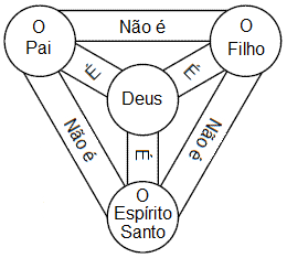 Trinitas, "trindade" ou "triunidade".